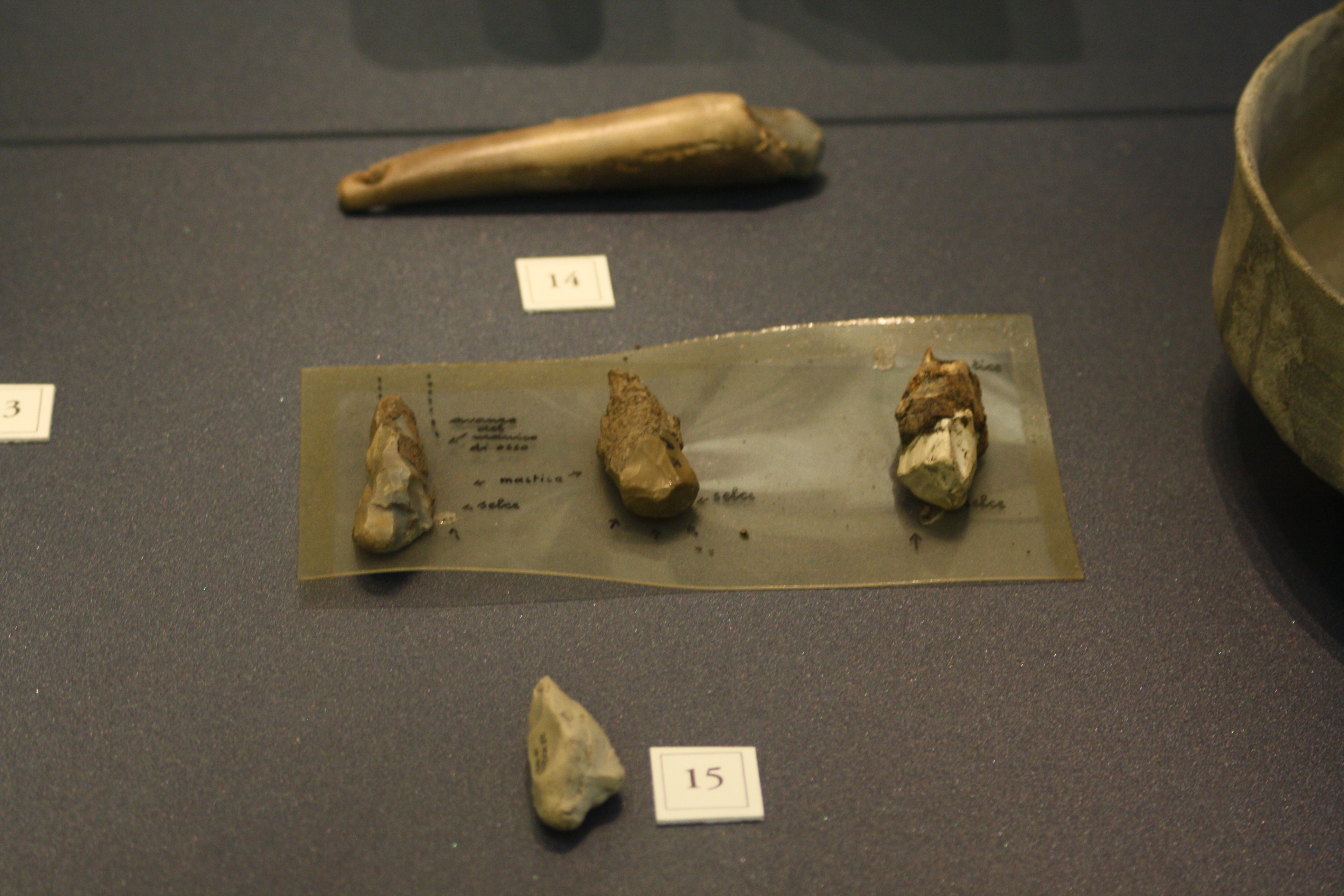 acciarini neolitici del museo Civico Archeologico di Varese